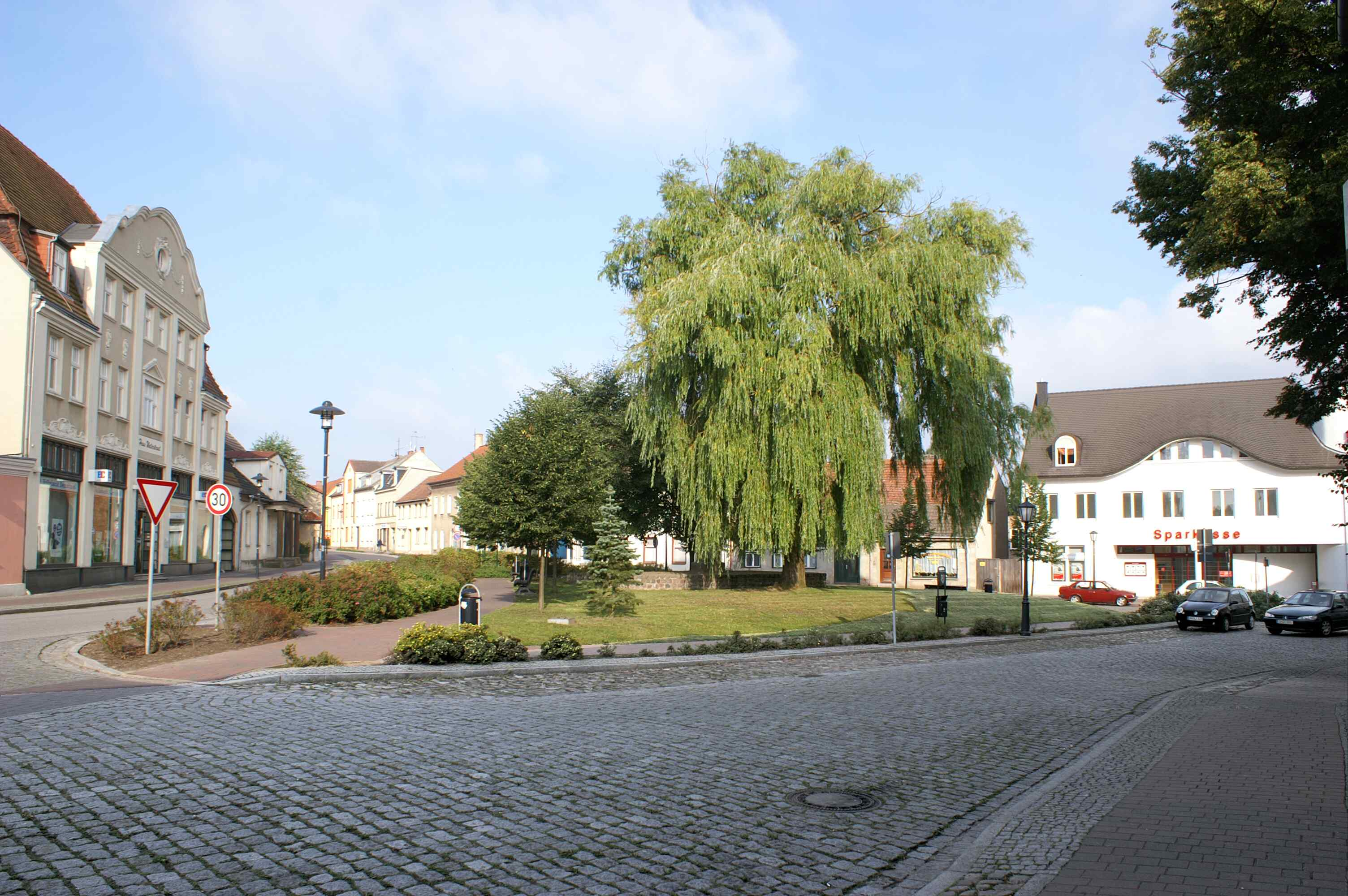 Jarmen - Landkreis Demmin - Neuer Markt